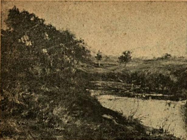 Pintura de Ernesto Quissak, executada em 1922, representando uma paisagem à beira de um rio, com vegetação na margem. Participou da Exposição Geral de Belas Artes de 1922, no Rio de Janeiro. Publicada na Revista Fon-Fon em 28 de outubro de 1922.